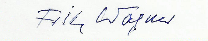 Fritz Wagner. Signatur eines am 18.12.1998 handgeschriebenen Briefes an mich.